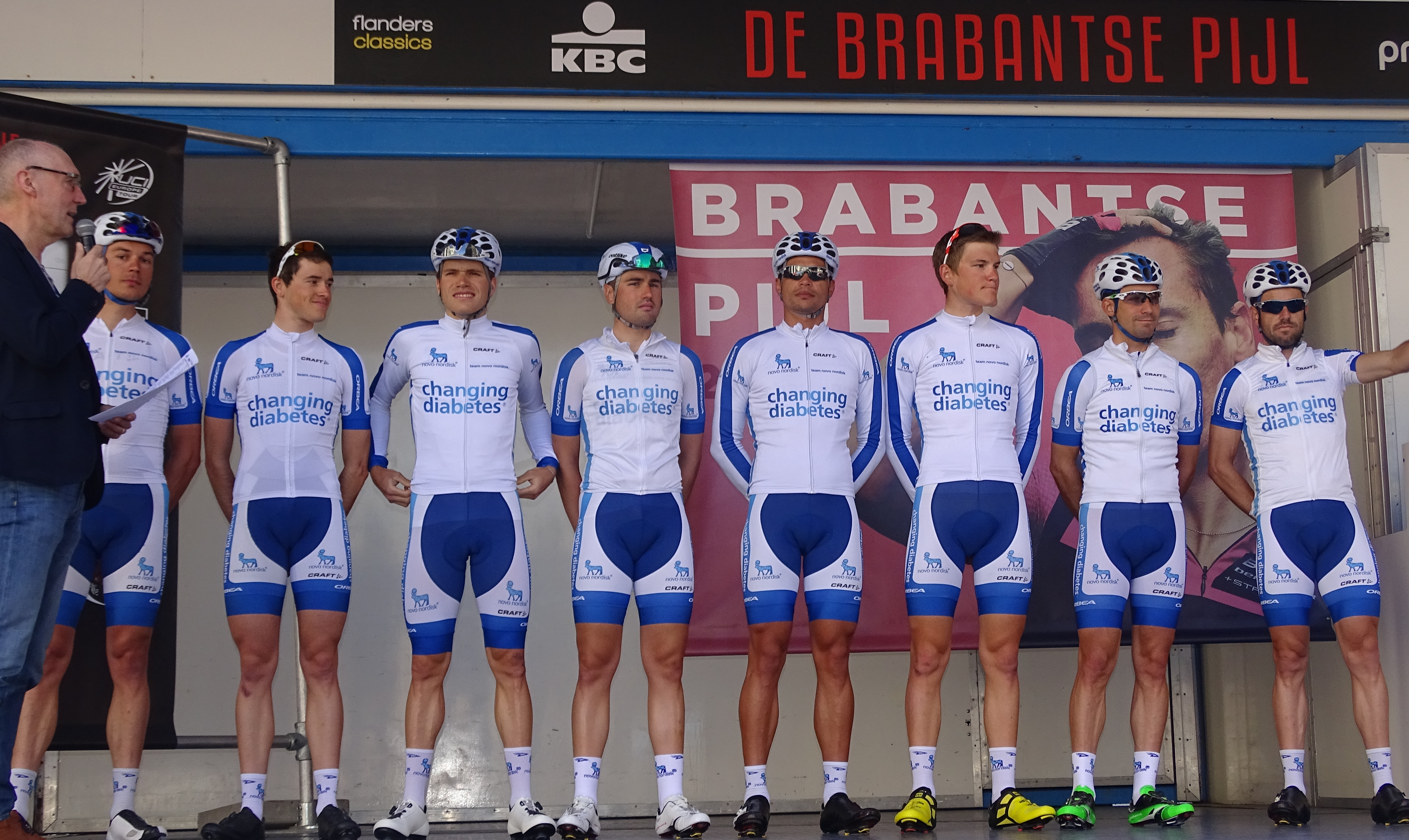 Reportage réalisé le mercredi 15 avril à l'occasion du départ de la Flèche brabançonne 2015 à Louvain, Belgique.